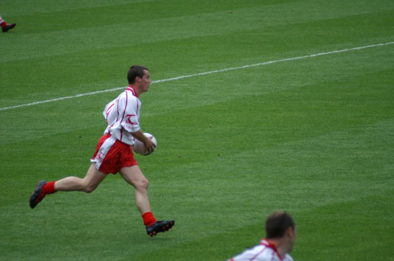 I angrep.